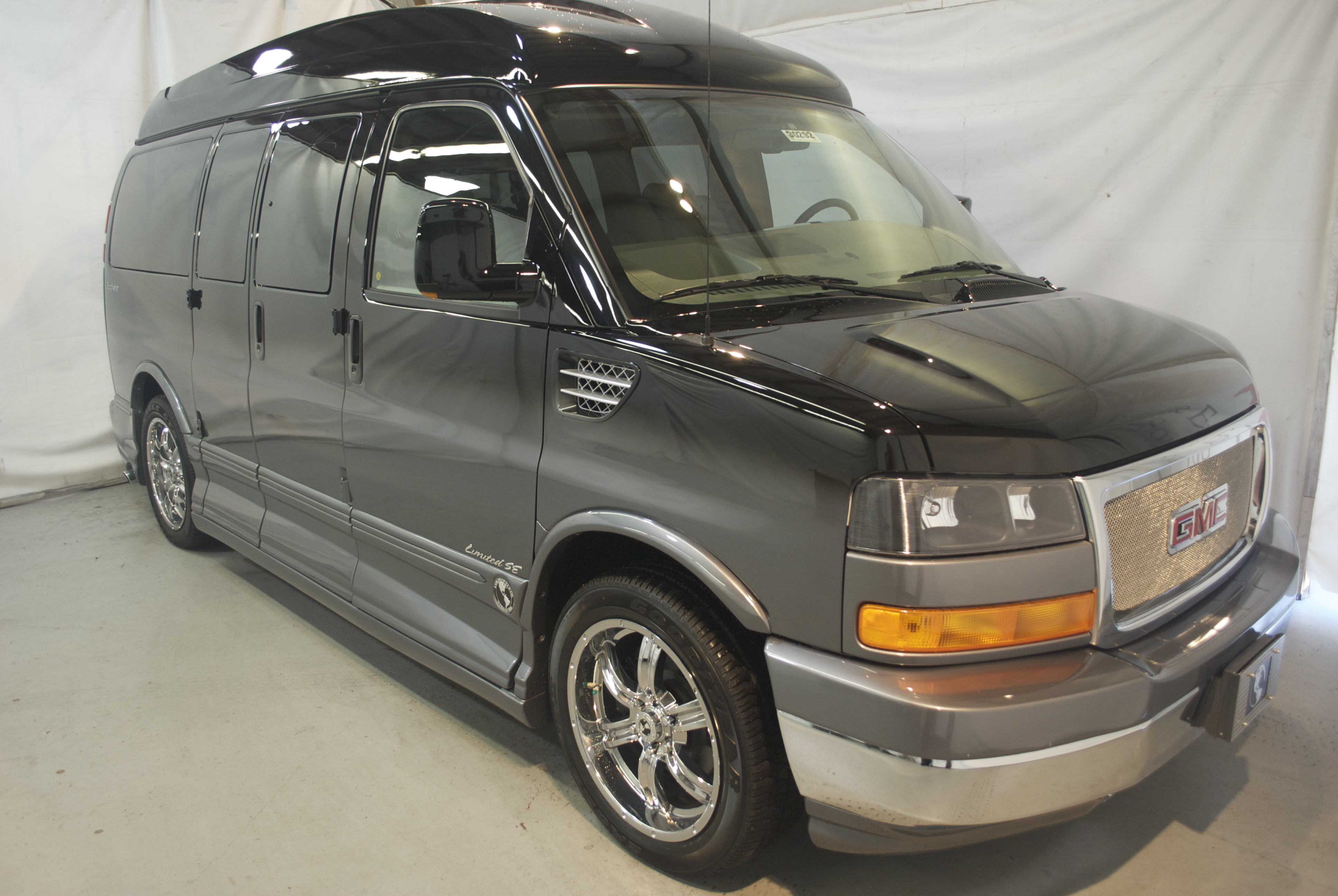 A 2009 GMC Savana Conversion Van